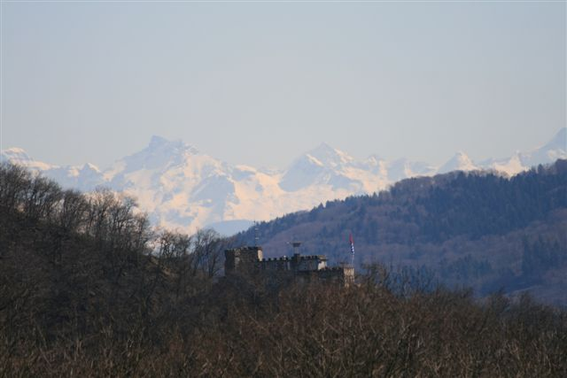 Schloss Schartefäls, Wettige AG, Schwiiz